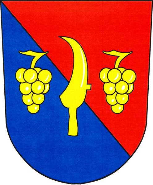 Znak obce Tvarožná Lhota